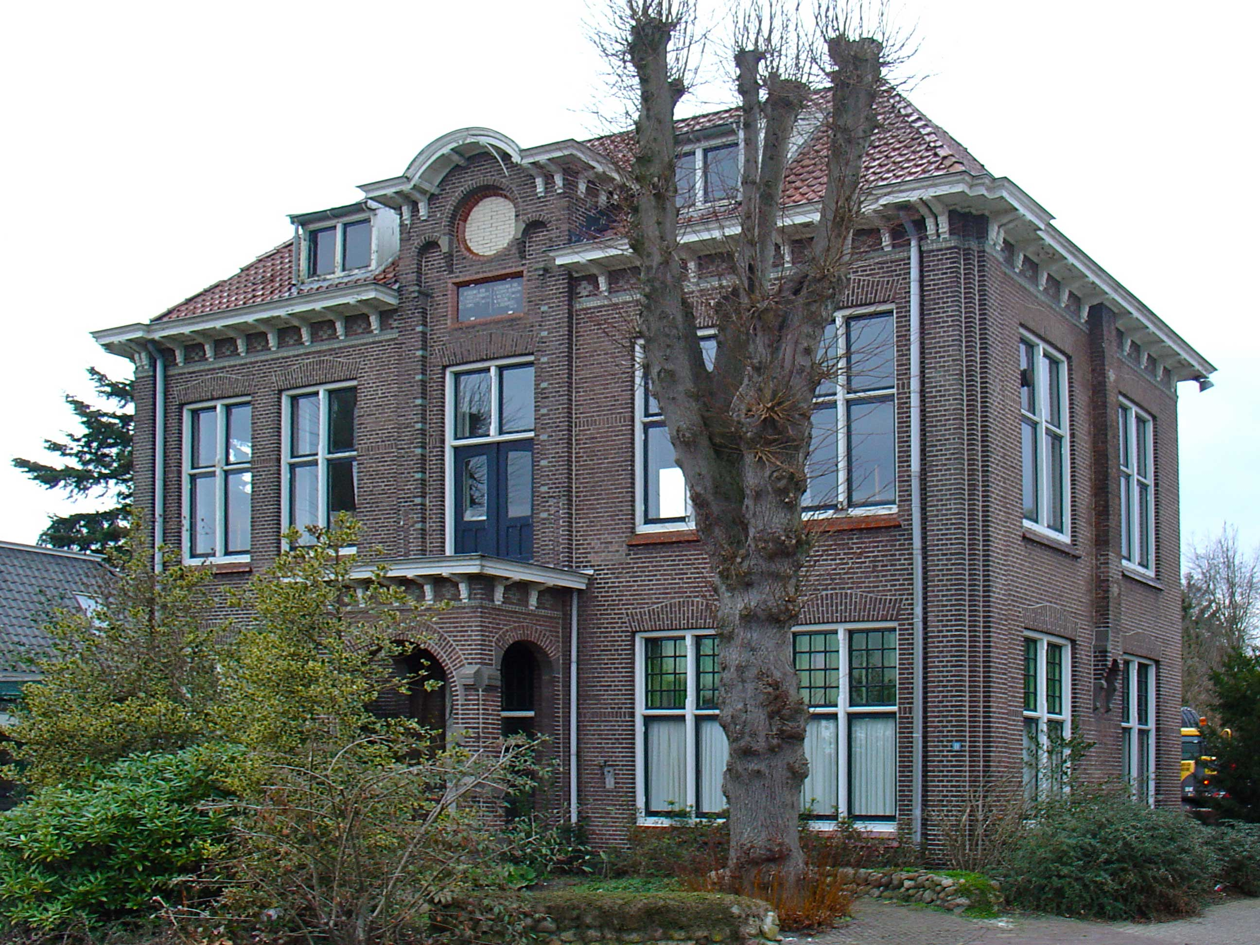 Voormalig gemeentehuis van de gemeente Gasselte aan de Vaart te Gasselternijveen